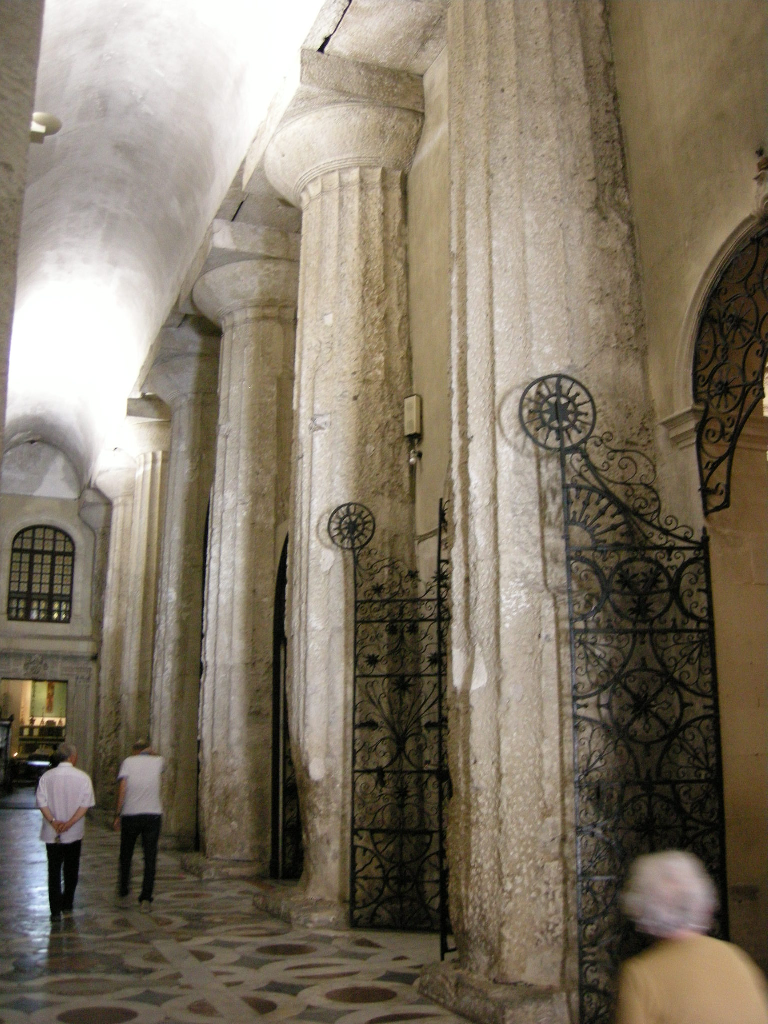 Ortigia, duomo, interno